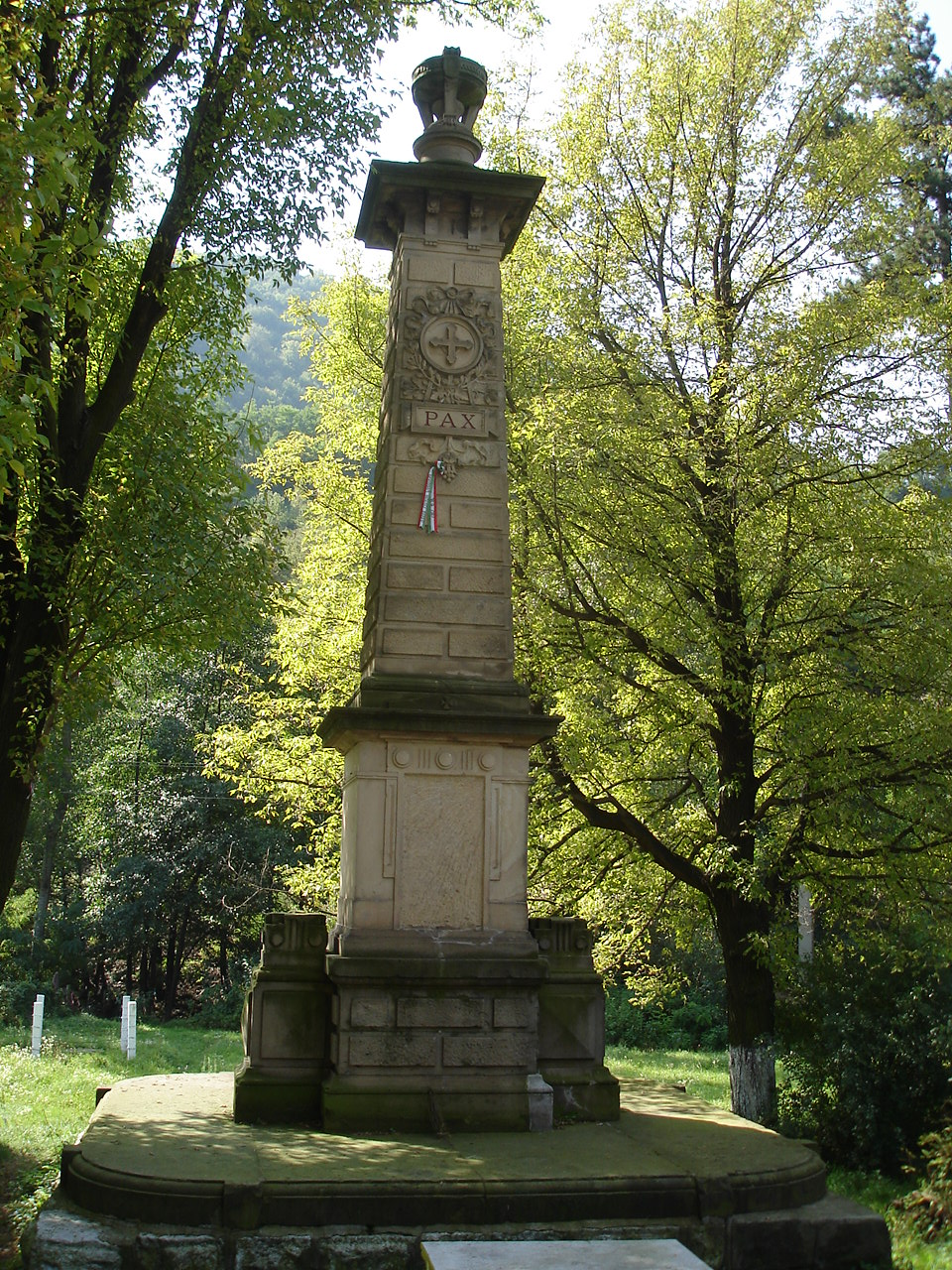 Monument în localitatea Presaca Ampoiului, județul Alba